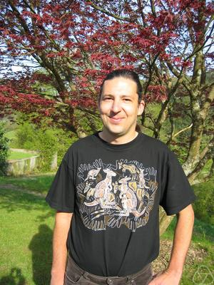 Andreas Čap